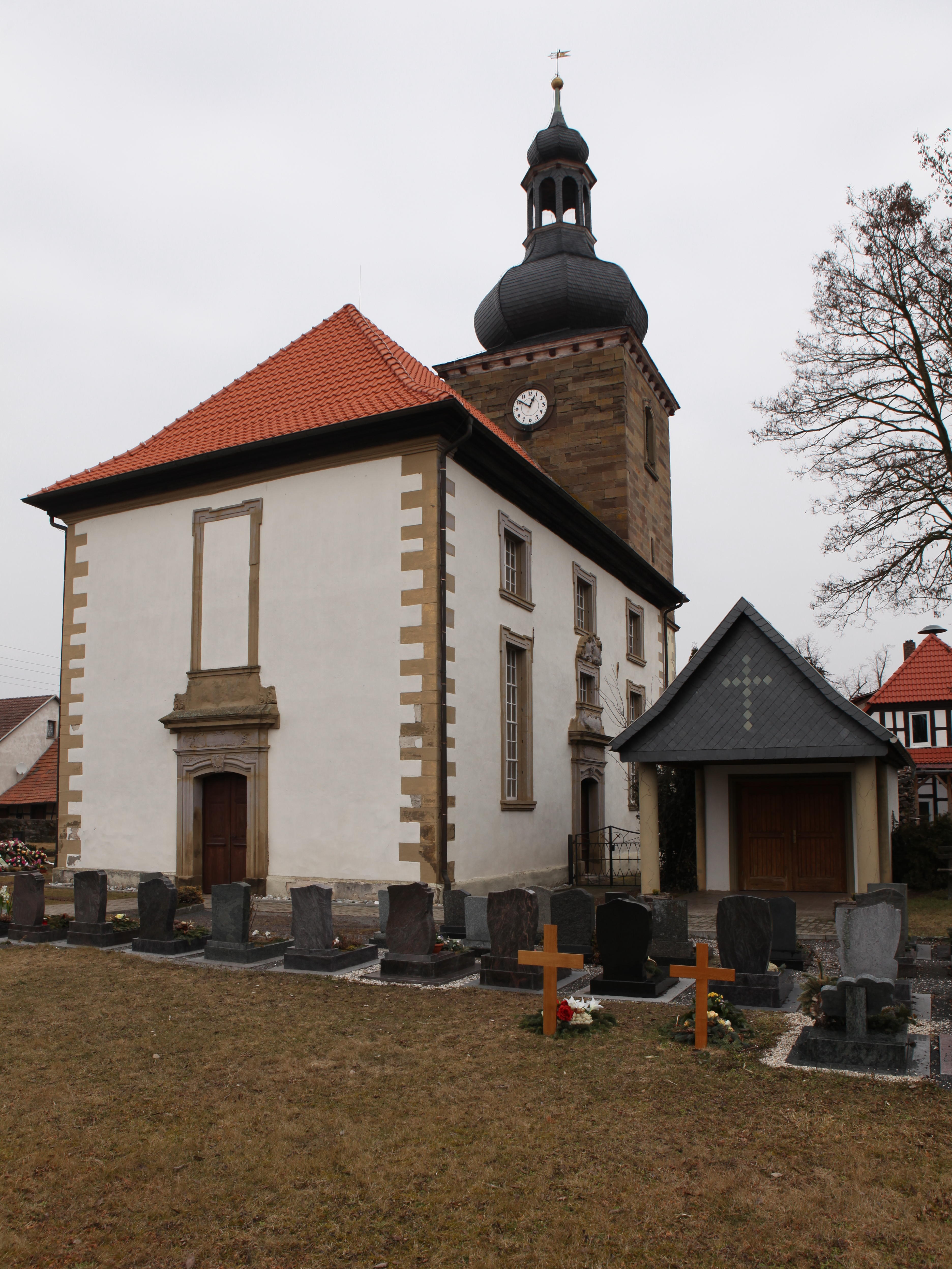 Ev. Kirche Linden, Landkreis Hildburghausen